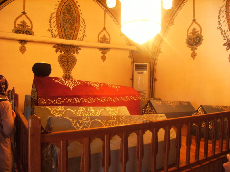 Hacı Bayram Türbesi